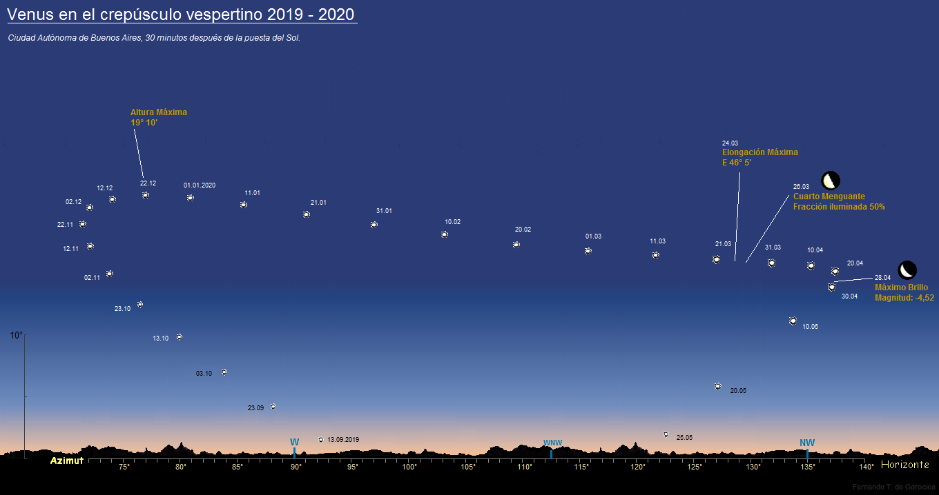 VENUS EN EL ATARDECER. Desde la Ciudad Autónoma de Buenos Aires, 30 minutos después de la puesta del Sol. - El 22.12.2019 altura máxima 19° 10’.- El 24.03.2020 a las 21:56 hs. (GMT) elongación máxima E 46° 5’.- El 27.03.2020 a la 01:00 hs. (GMT) cuarto menguante, fracción iluminada 50%.- El 28.04.2020 a las 15:00 hs. (GMT) brillo máximo, magnitud -4,52.